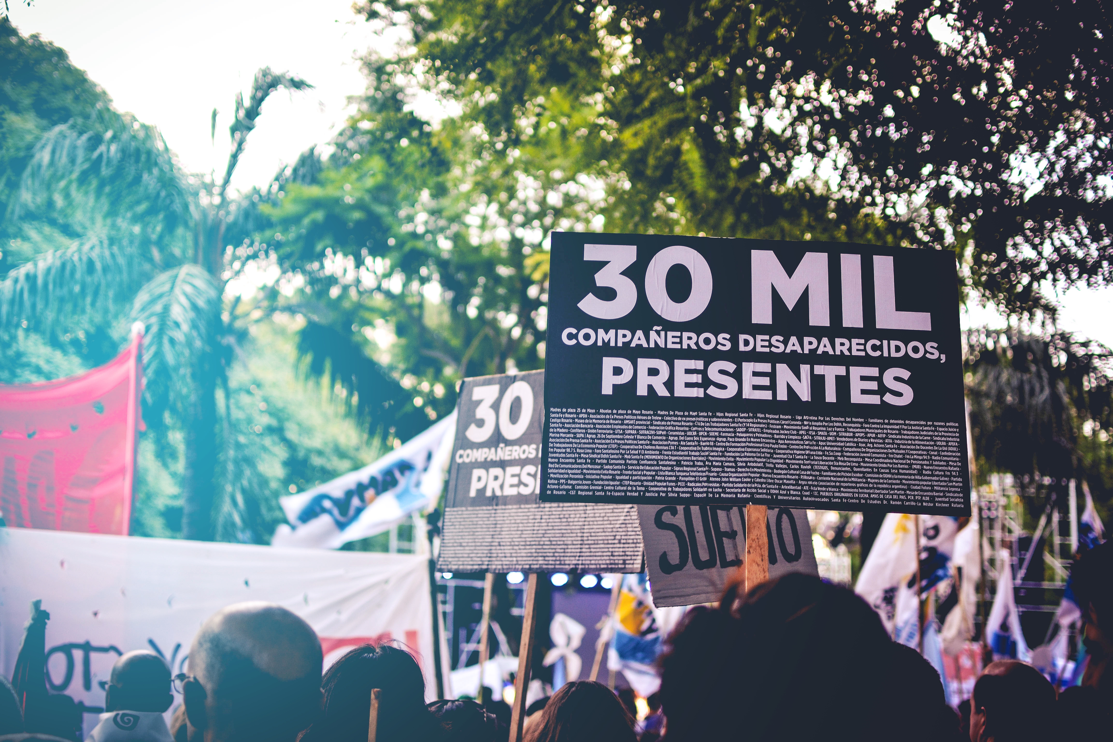 24M Marchas en Día Nacional de la Memoria por la Verdad y la Justicia en Argentina